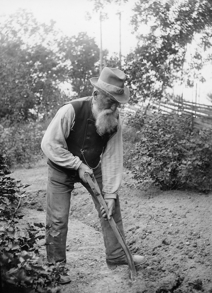 The farmer Wilhelm Fredriksson, 73 years old, digging in a garden. Lantbrukaren Wilhelm Fredriksson, 73 år, som gräver i en trädgård. Parish (socken): Husby-Långhundra Province (landskap): Uppland Municipality (kommun): Knivsta County (län): Uppsala Photograph by: Einar Erici Date: 1934 Format: Print Kulturmiljöbild: 16001000285504 (Persistent URL) Read more about the photo database (in english)